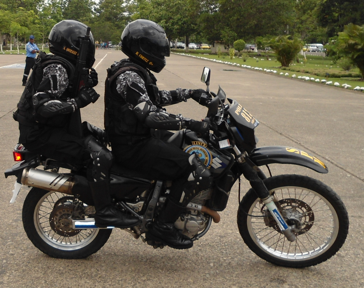 Unidades del Servicio Policivo Motorizado "Lince" de la Policía Nacional de Panamá, vistiendo el nuevo uniforme adoptado en el mes de mayo de 2012.